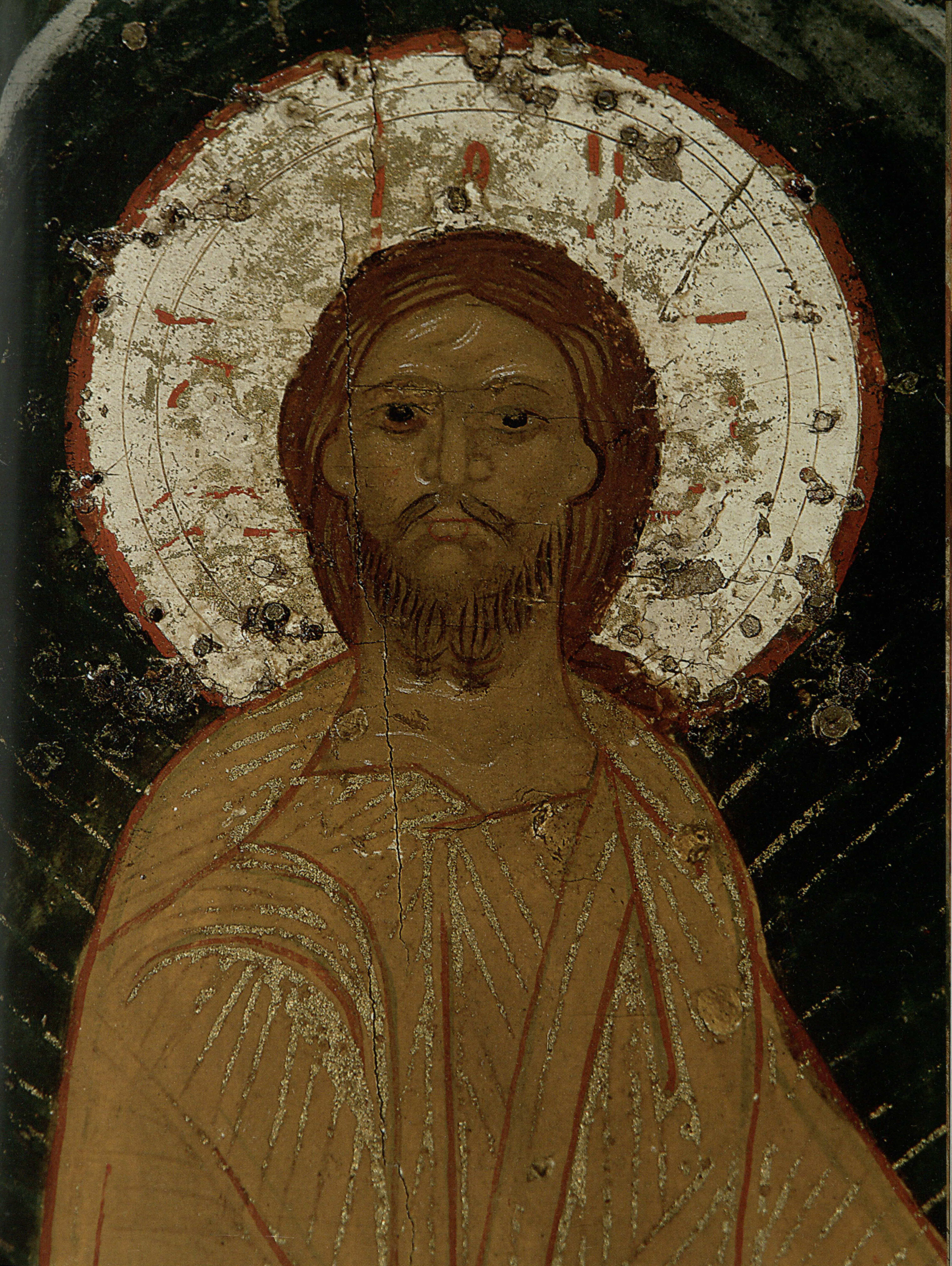 Успение Богоматери. Первая четверть XVI века. Дерево, ковчег, паволока, левкас, темпера. ВГИАХМЗ. Фрагмент Христос во славе